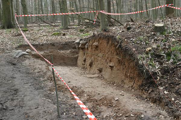 Römerlager - Eine der Grabungsstellen im Sudholz